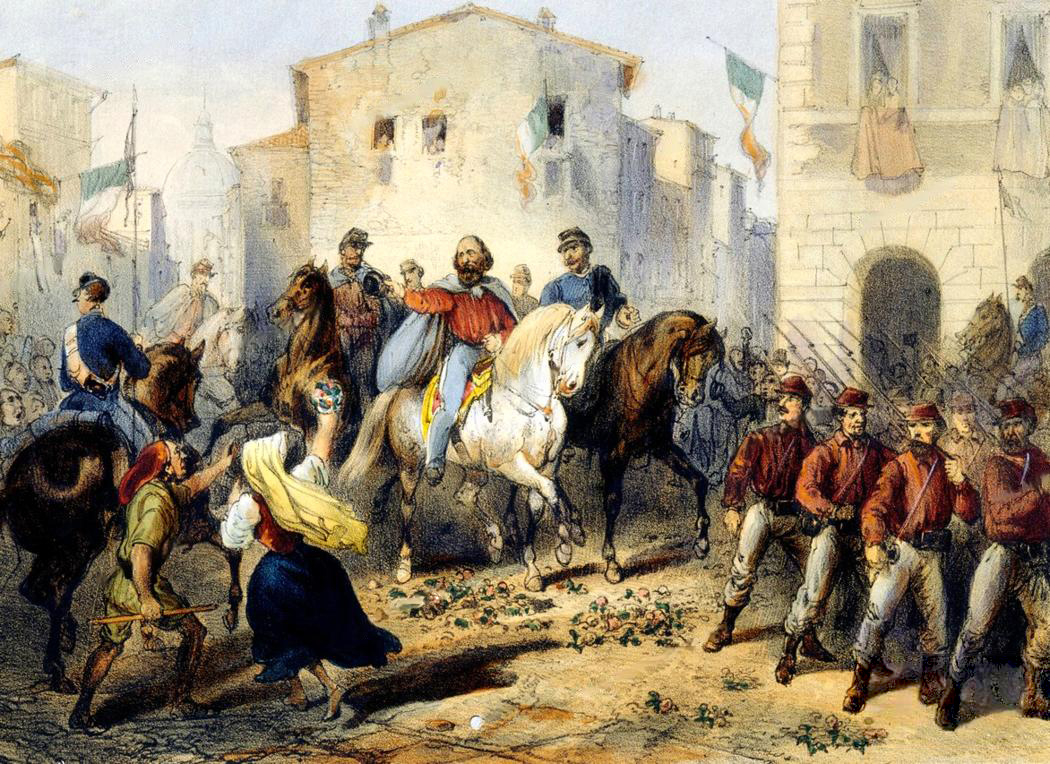 Ingresso di Giuseppe Garibaldi in Messina - litografia, ridotta